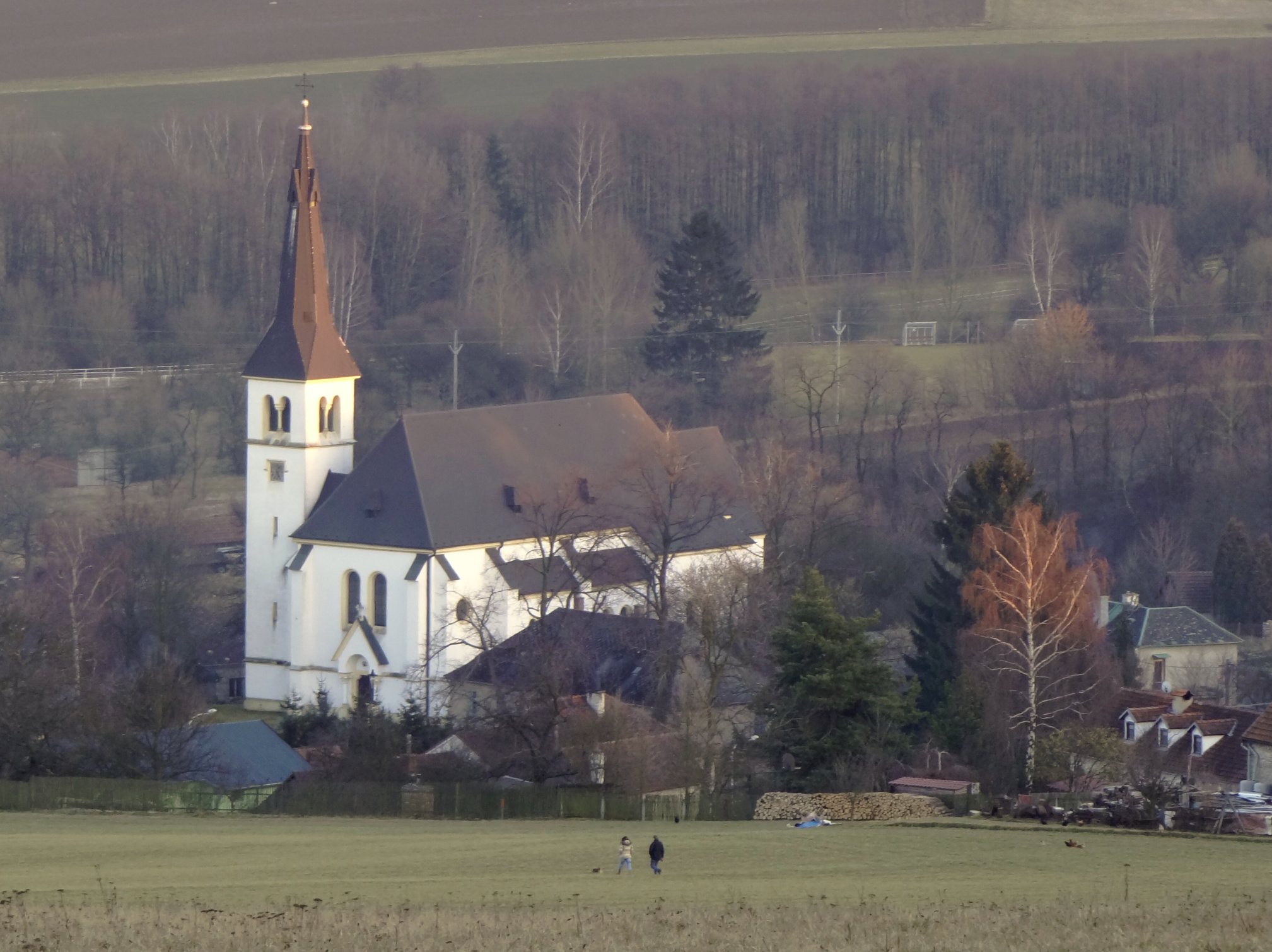 Kostel svatých Cyrila a Metoděje, přestavěný v novorománském slohu v obci Kladky.